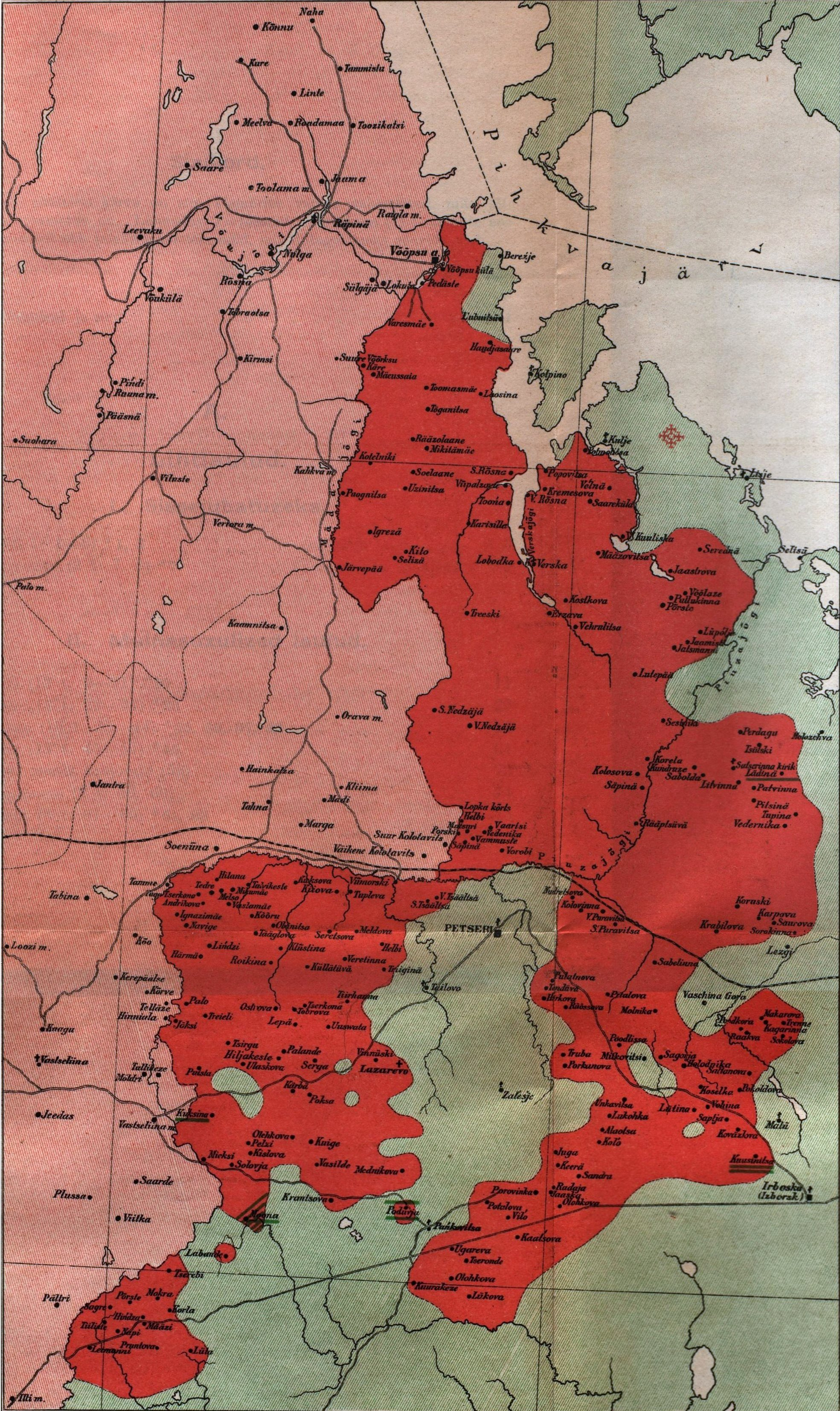 Setude asualad 1902 Jakob Hurda andmetel. Tumepunasega setukeste asualad, rohelisega venelaste asualad, helepunasega Liivimaa. külad, kus setukesed vähem venestatud on, on märgitud rohelise joonega külanime all. Ning kaks joont tähendavad kanget venestamist. Külad on tähistatud ümarguse täpiga, alevid neljanurgalise täpiga, rist täpi juures näitab,et seal on kirik.